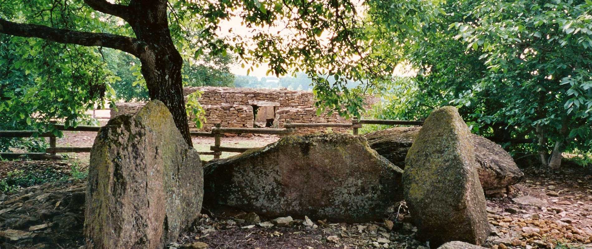 Dolmen des Pierres-Folles (au premier plan) et dolmen à couloir dit « Ciste des Cous » (au second plan) à Bazoges-en-Pareds (85). .